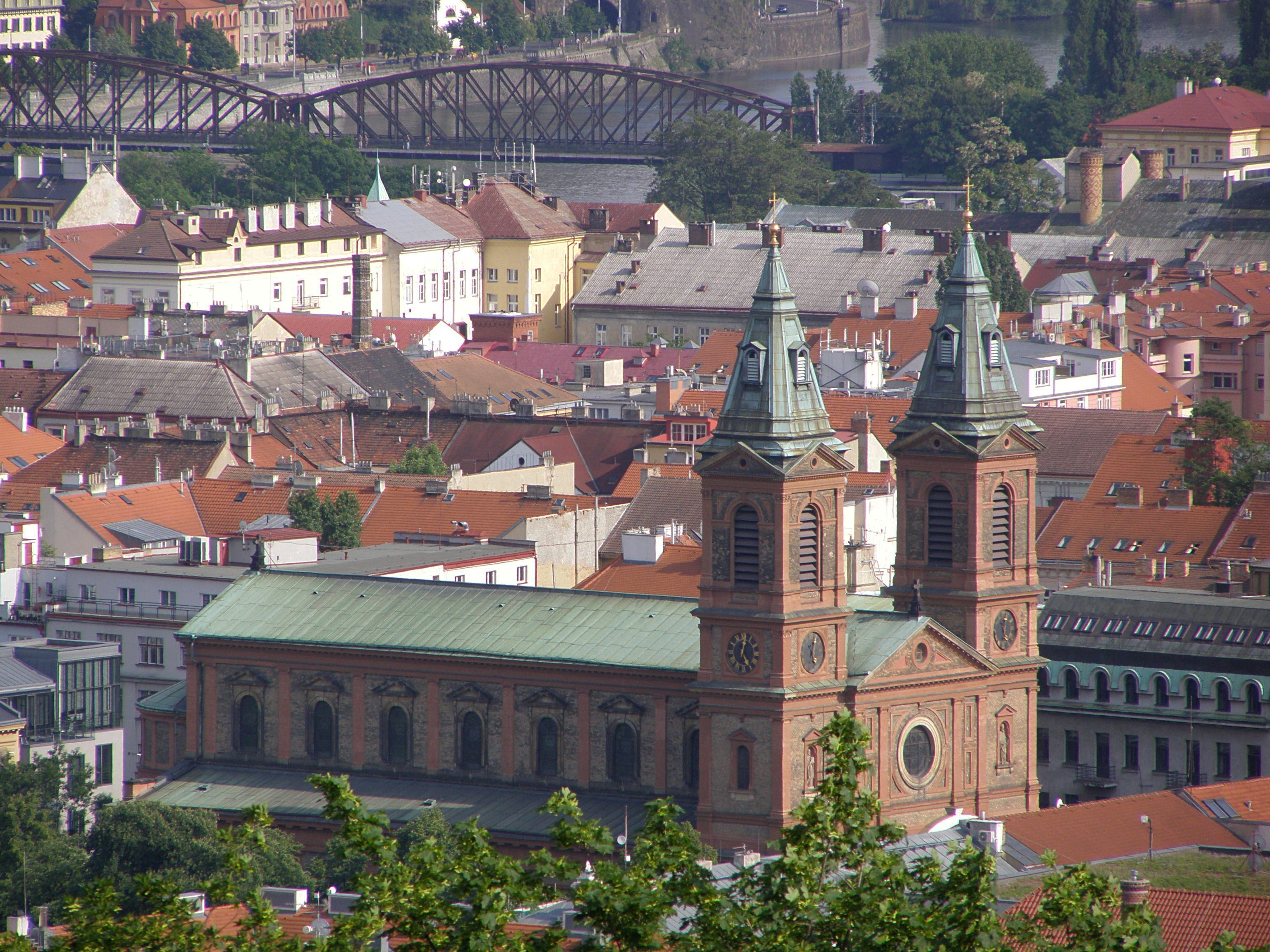 Praha, Smíchov, kostel sv. Václava, pohled z Petřína